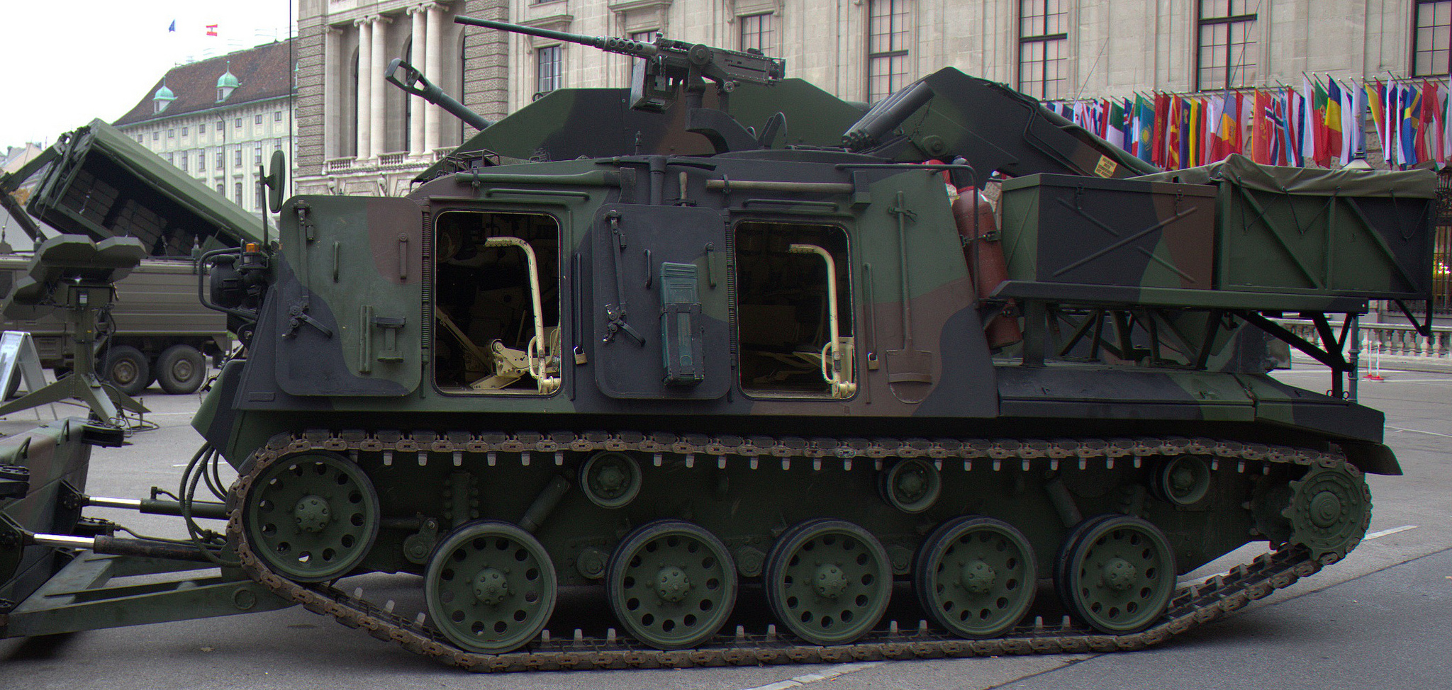 Dieser Pionierpanzer (PiPz) des Österreichischen Bundesheeres basiert auf dem Fahrgestell des Jagdpanzers "Kürassier".